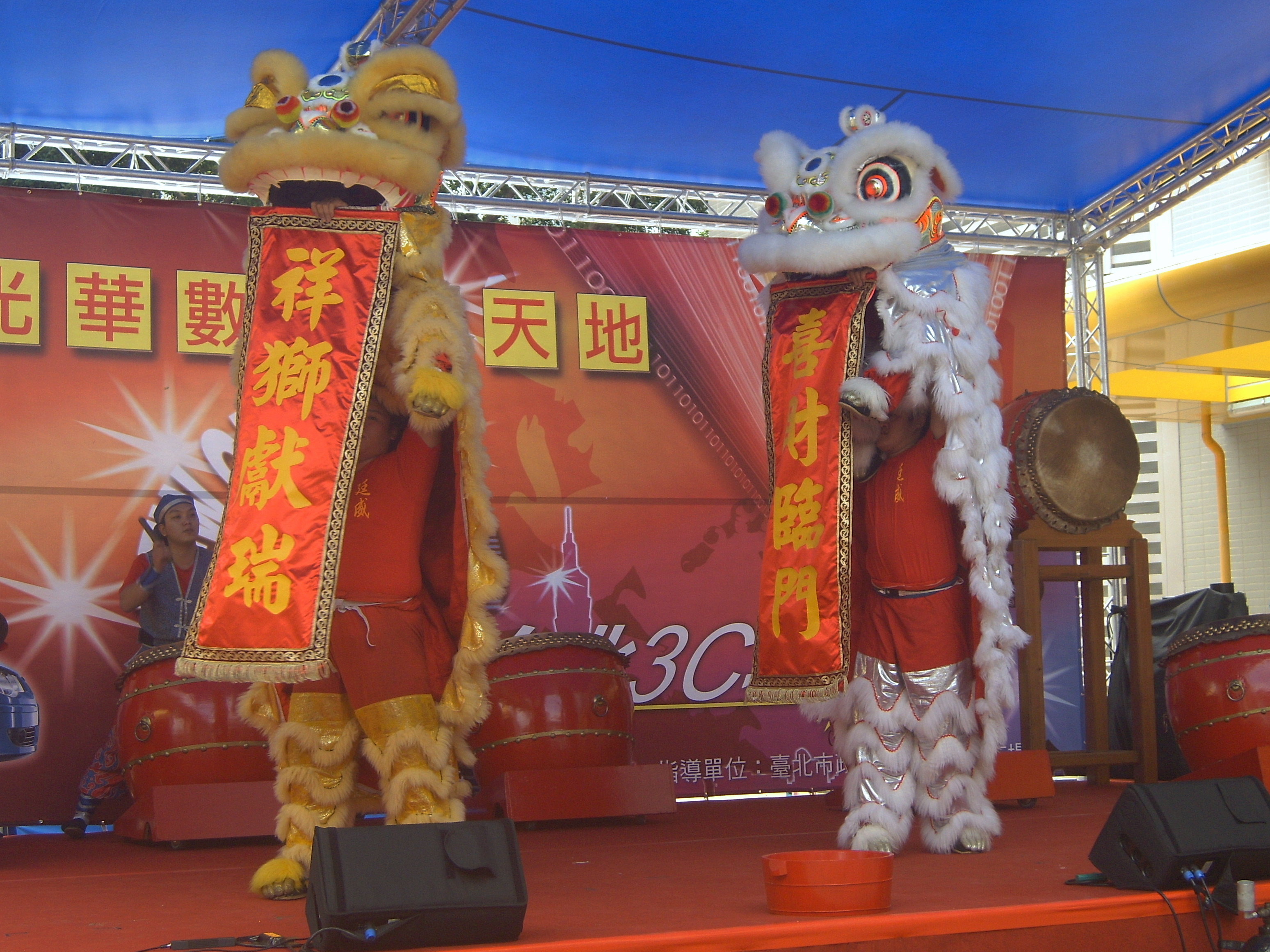 Launch of Guang Hua Digital Plaza: Lion Dancing in Opening.